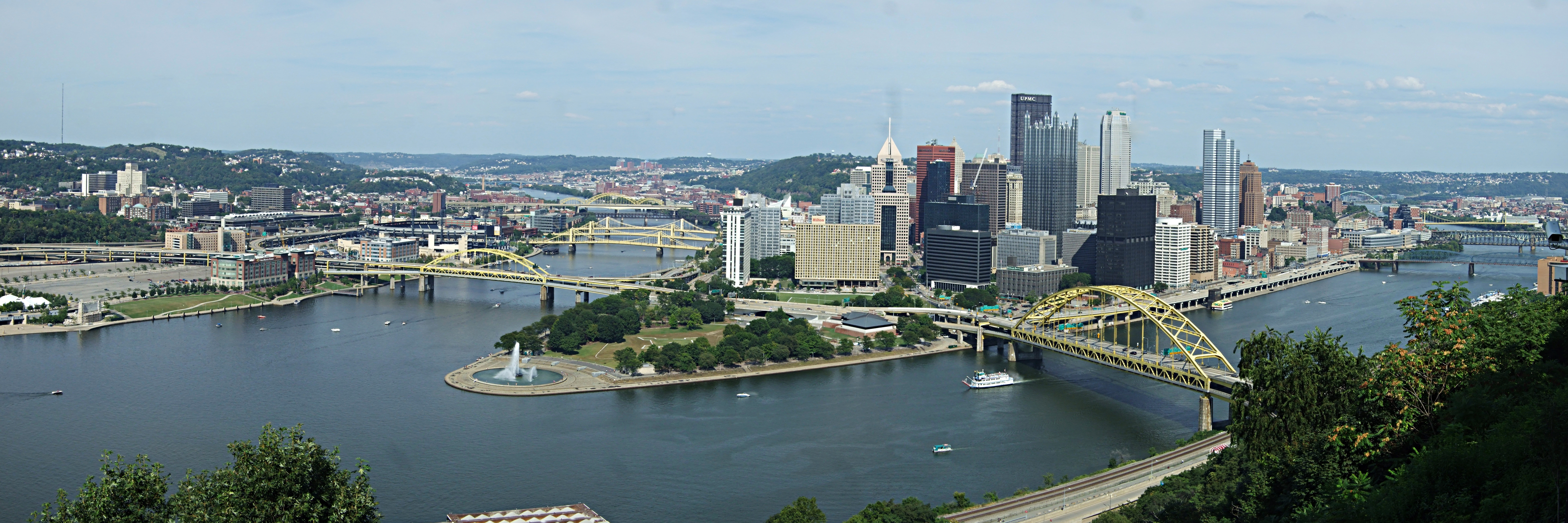 Pittsburgh, Pennsylvania; skyline, taken from Mount Washington